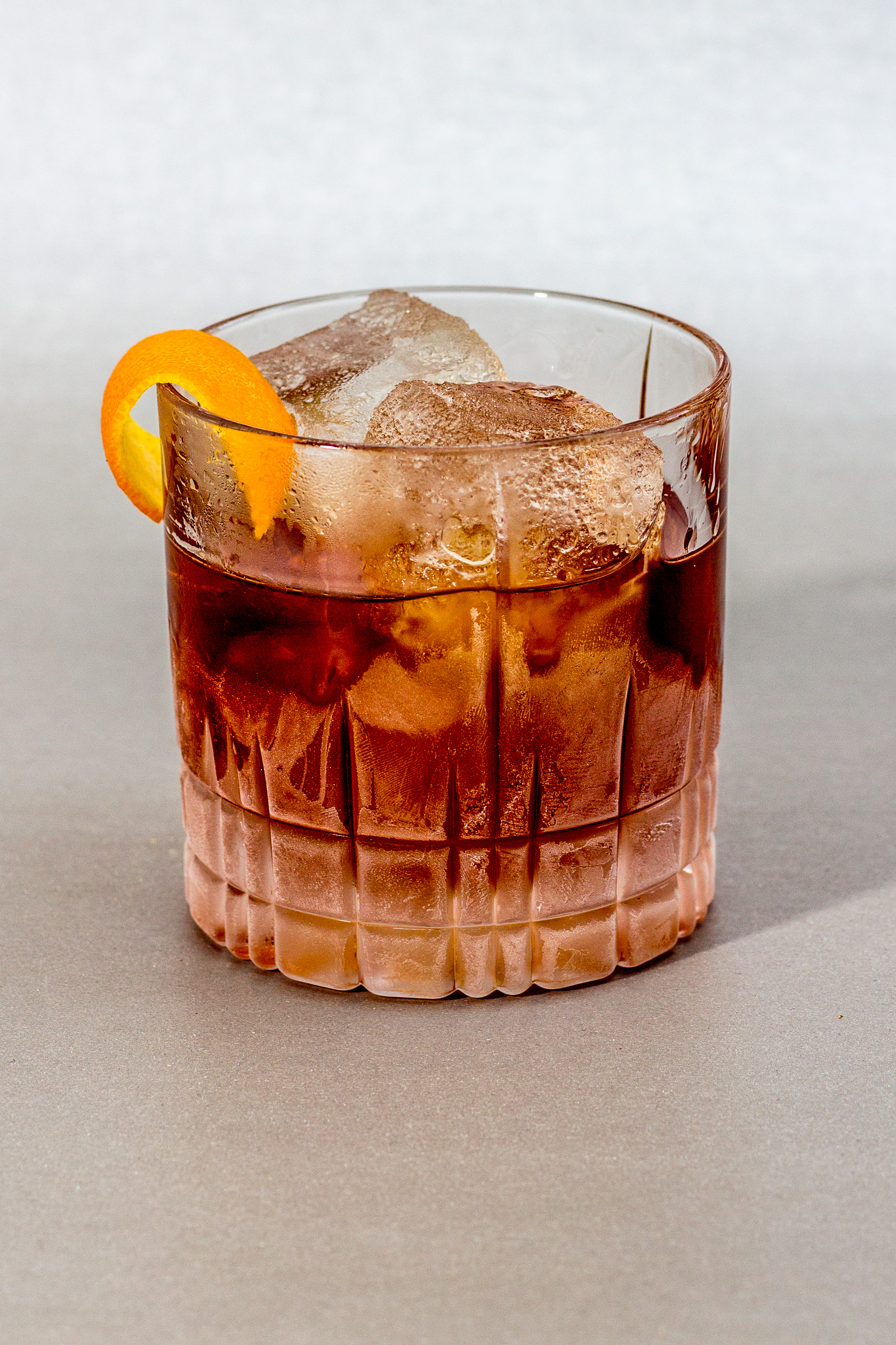 Vieux Carré in Tumbler